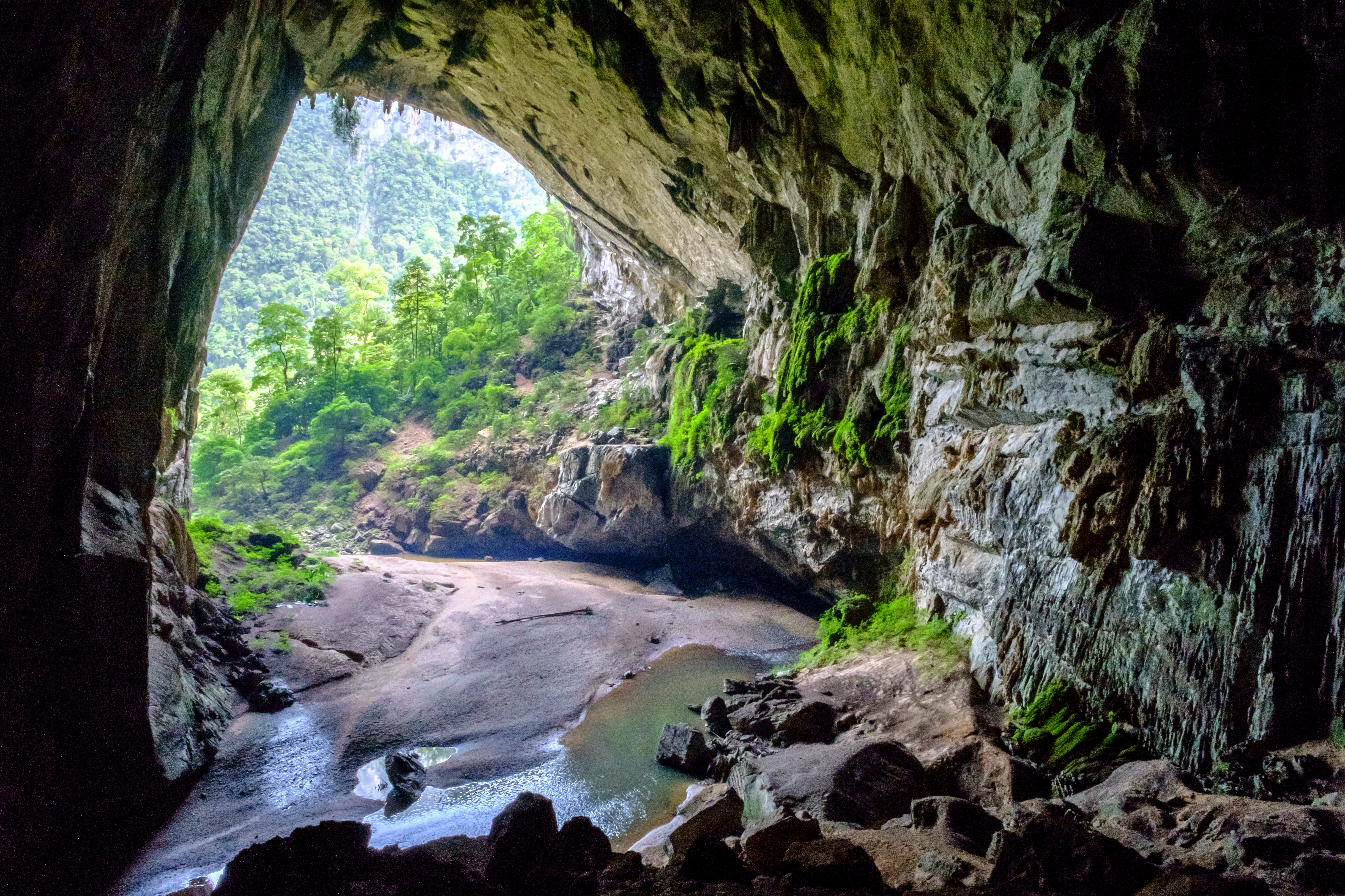 L'une des trois entrées de la grotte Én, dans le parc national de Phong Nha-Kẻ Bàng, au Viêt Nam.